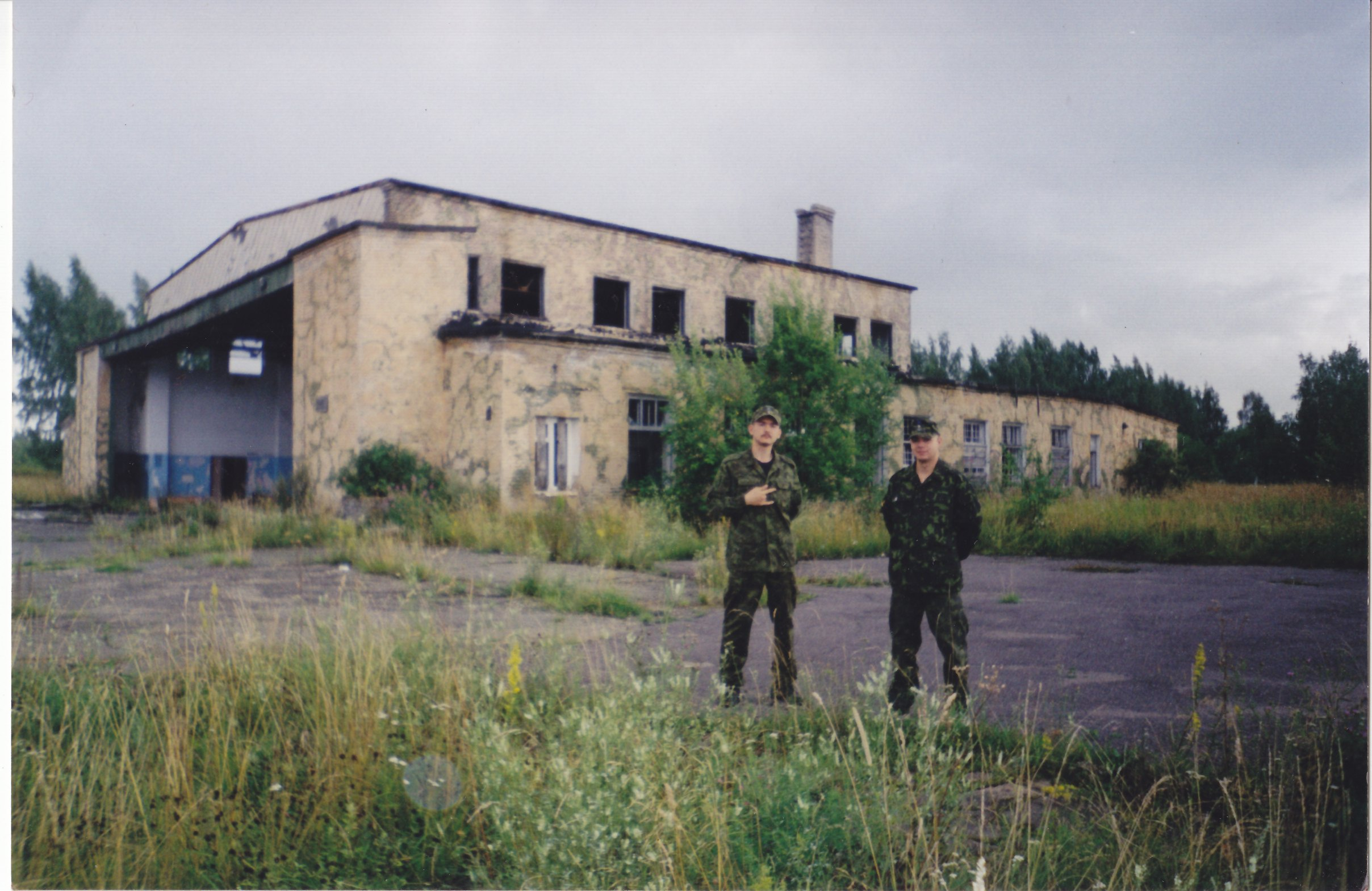 Ангар технико-эксплуатационной части (ТЭЧ) 656 ИАП через 5 лет после ухода Российской армии